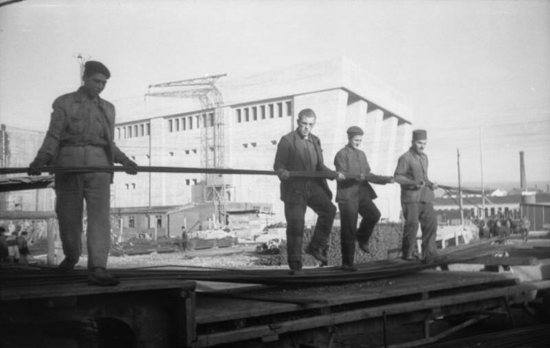 An der Atlantikküste Lastwagen bringen Unmengen von Material: Eisen, Zement usw. für die Bunkerbauten. PK-Kriegsberichter: Tölle Okt. 1942, La Pallice